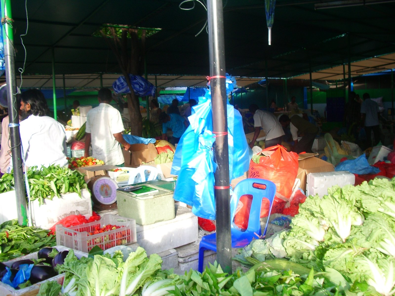 Mercat a Male; foto feta per J. Ollé el juliol del 2006.